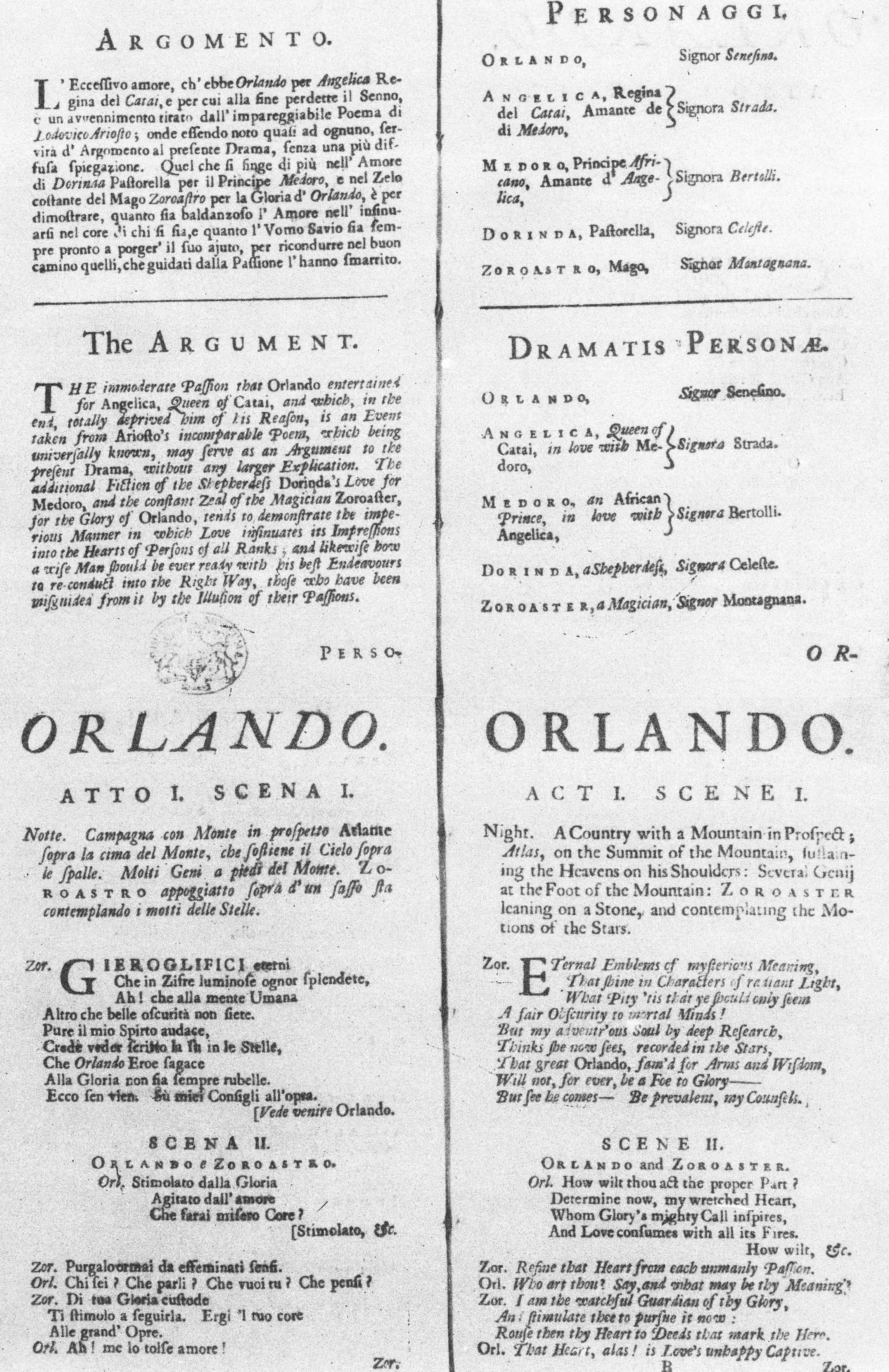 Argomento des Original-Librettos von 1733